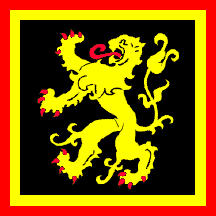 Vlag van het Belgicisme, Belgisch-Staatsnationalisme sinds 2008 gevoerd.